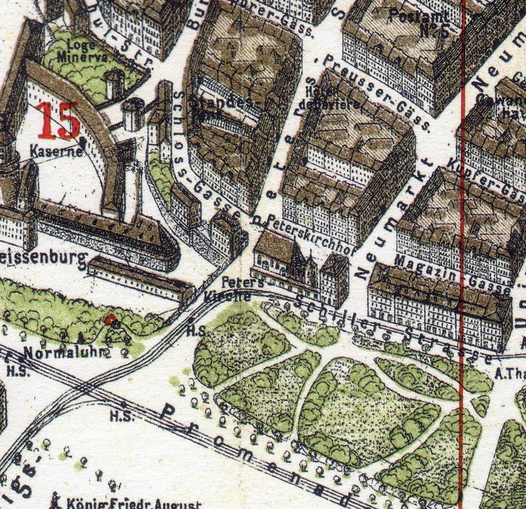 Alte Peterskirche Leipzig, Stadtplanansicht 1884.